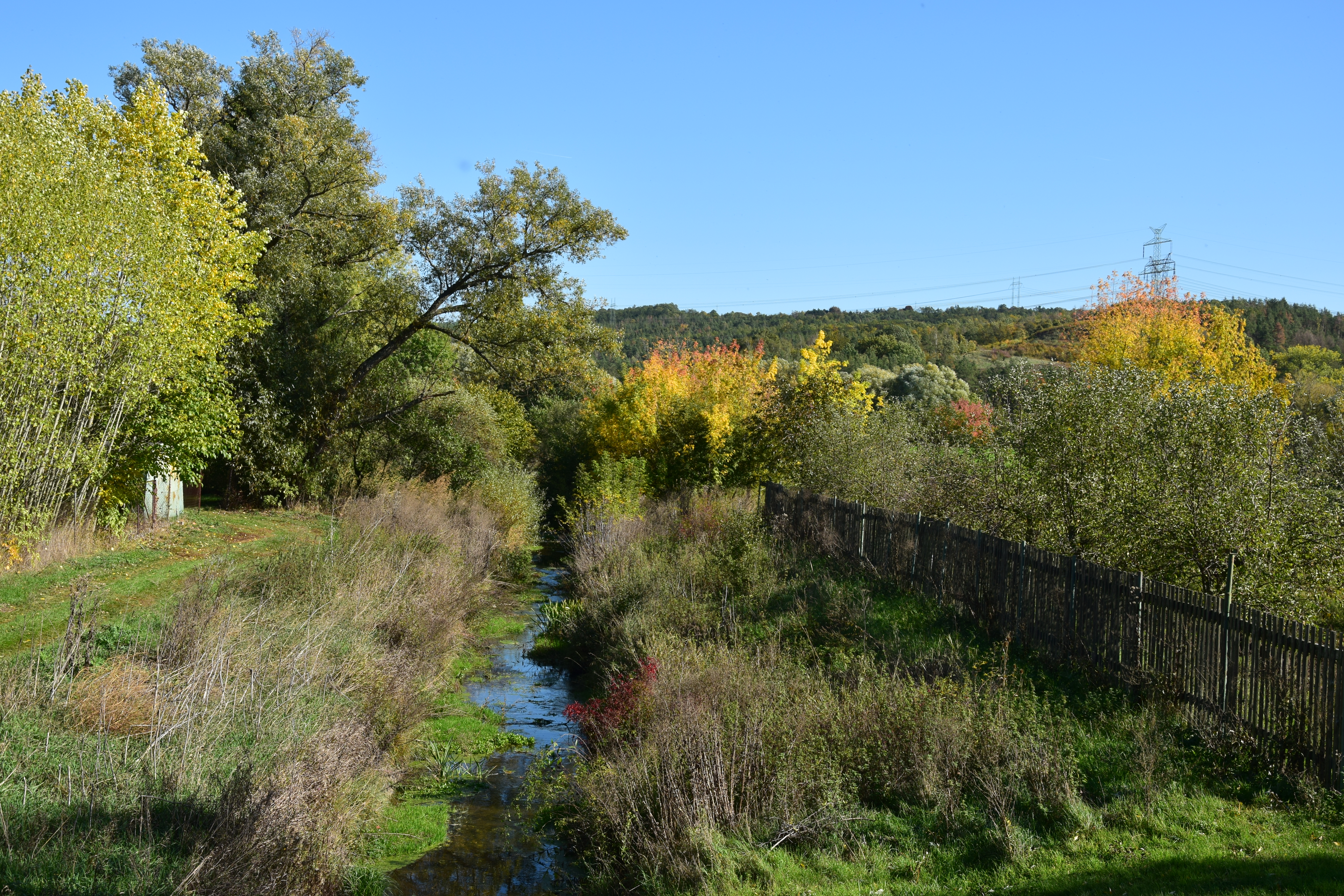 Kněžice – koryto potoka Leska pod mostem